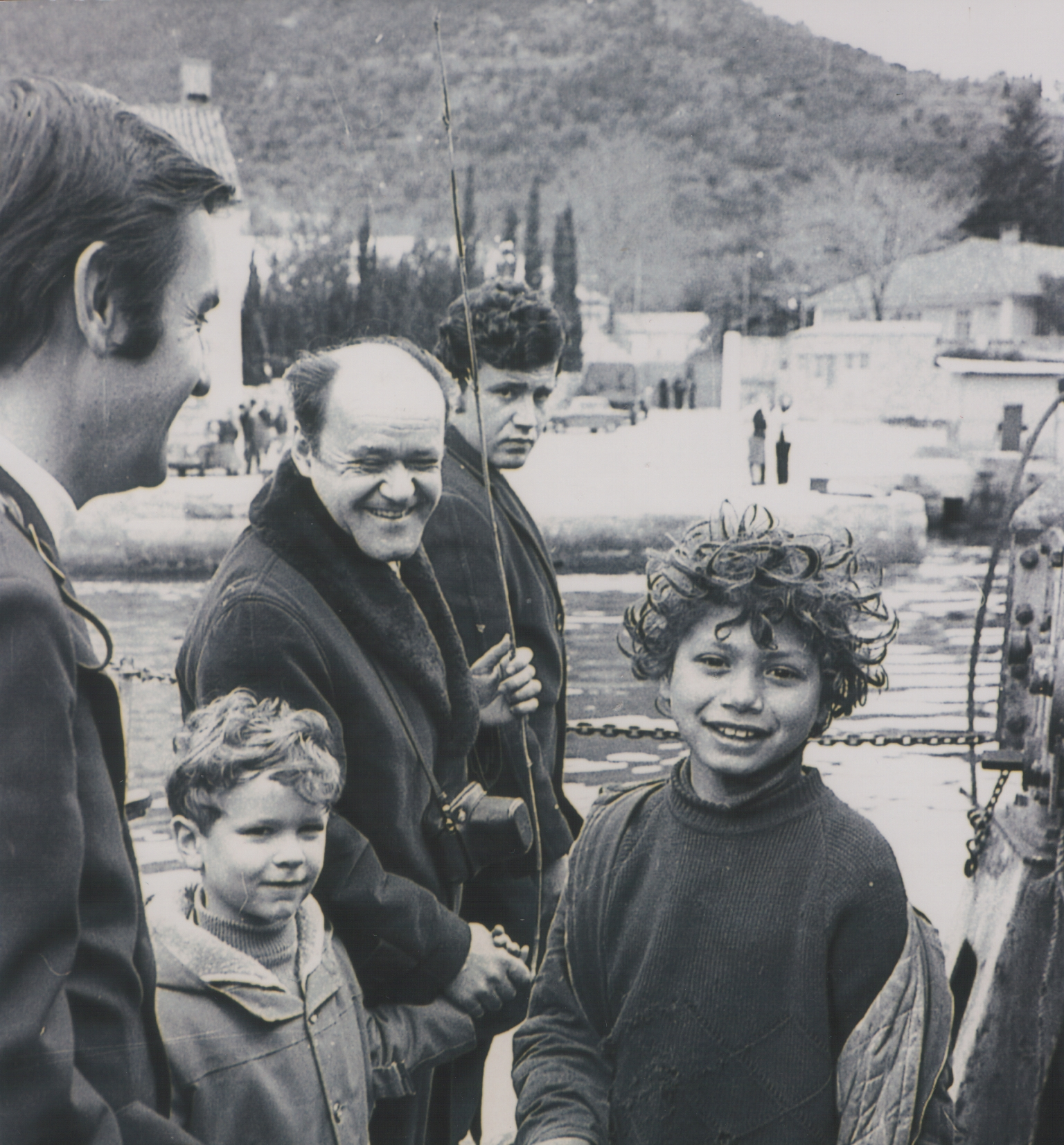 Milivoj Jugin, vazduhoplovni inzenjer, konstruktor, tv komentator, publicista.foto: Stevan Kragujević (po odobrenju kćerke Tanje Kragujević).)